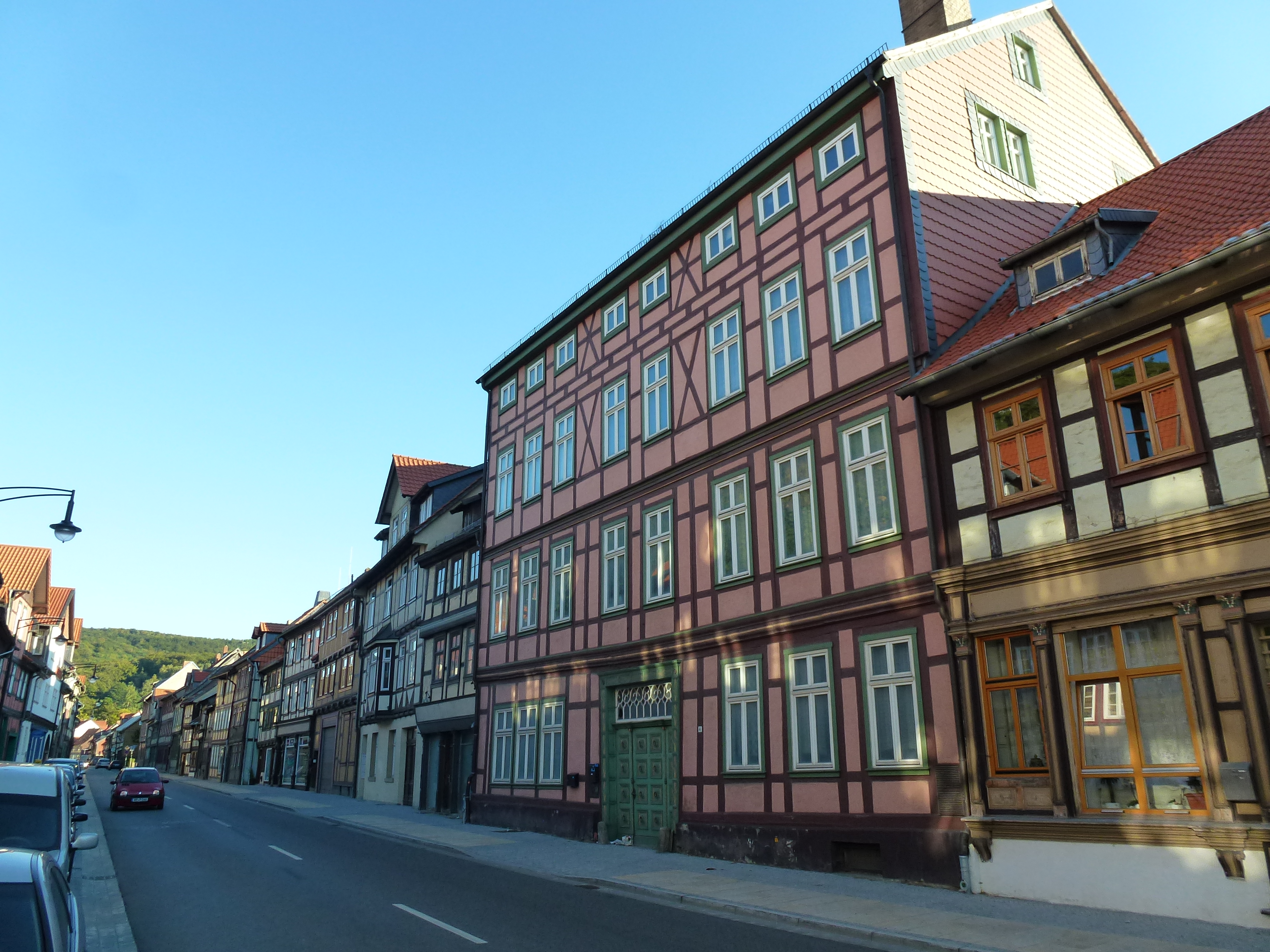 Blick in die Nöschenröder Straße in Wernigerode.